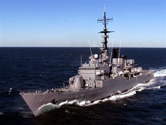 frigate Almirante Briòn